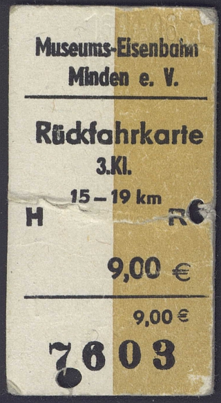 Fahrkarte der Musemums Eisenbahn Minden aus Minden, Nordrhein-Westfalen. Aufdruck: Museums-Eisenbahn Minden e.V. --- Rückfahrkarte 3. Kl 15-19 km H R 9€ --- 9€ 7603